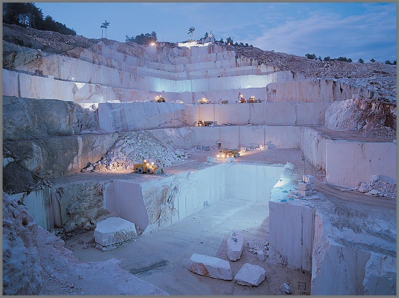 Finike Mermer Ocağı Görüntüleri